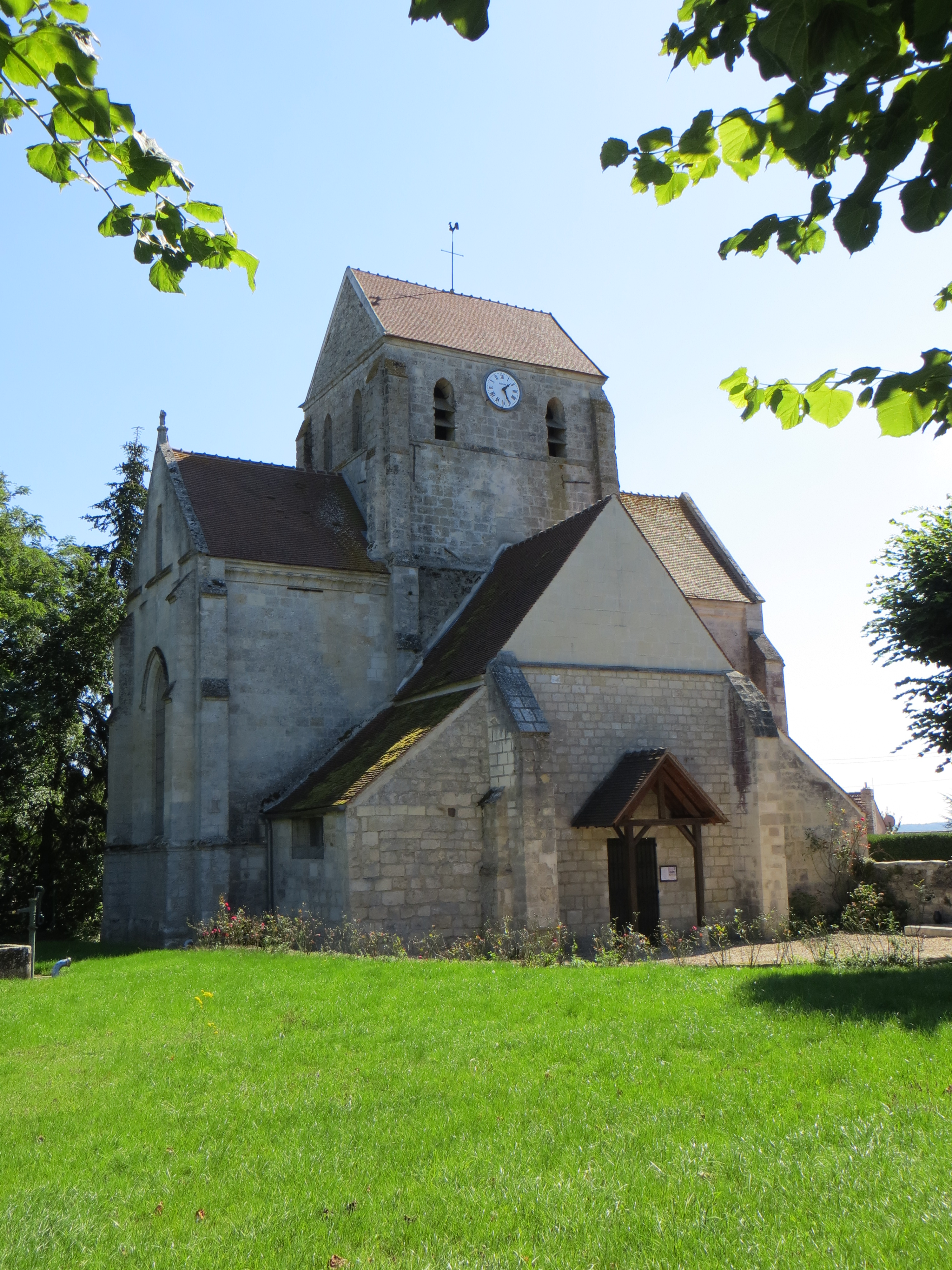 Vue générale de l'église